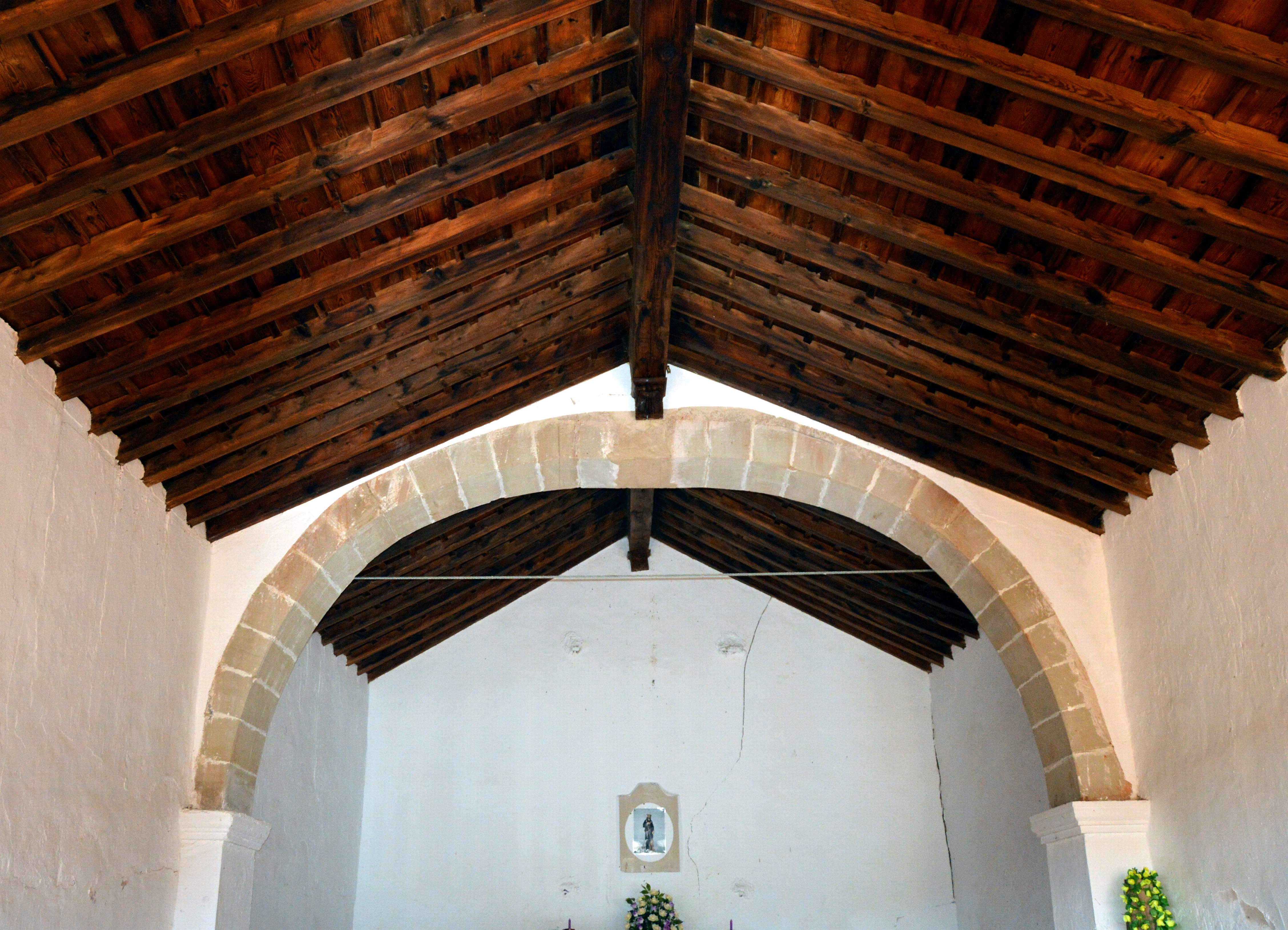 Interior de la Ermita de San Roque en Puebla de San Miguel (Valencia), detalle del arco toral y armadura de la cubierta (2019).